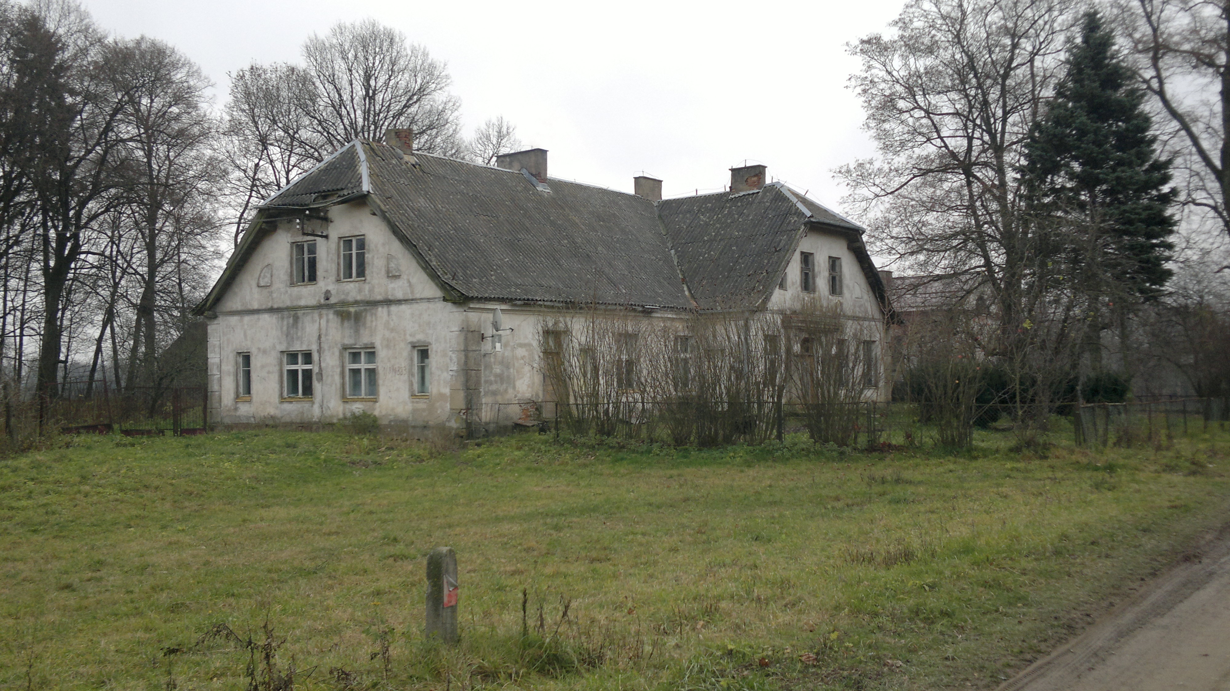 Gordejki Małe, zespół dworski, XIX, XX